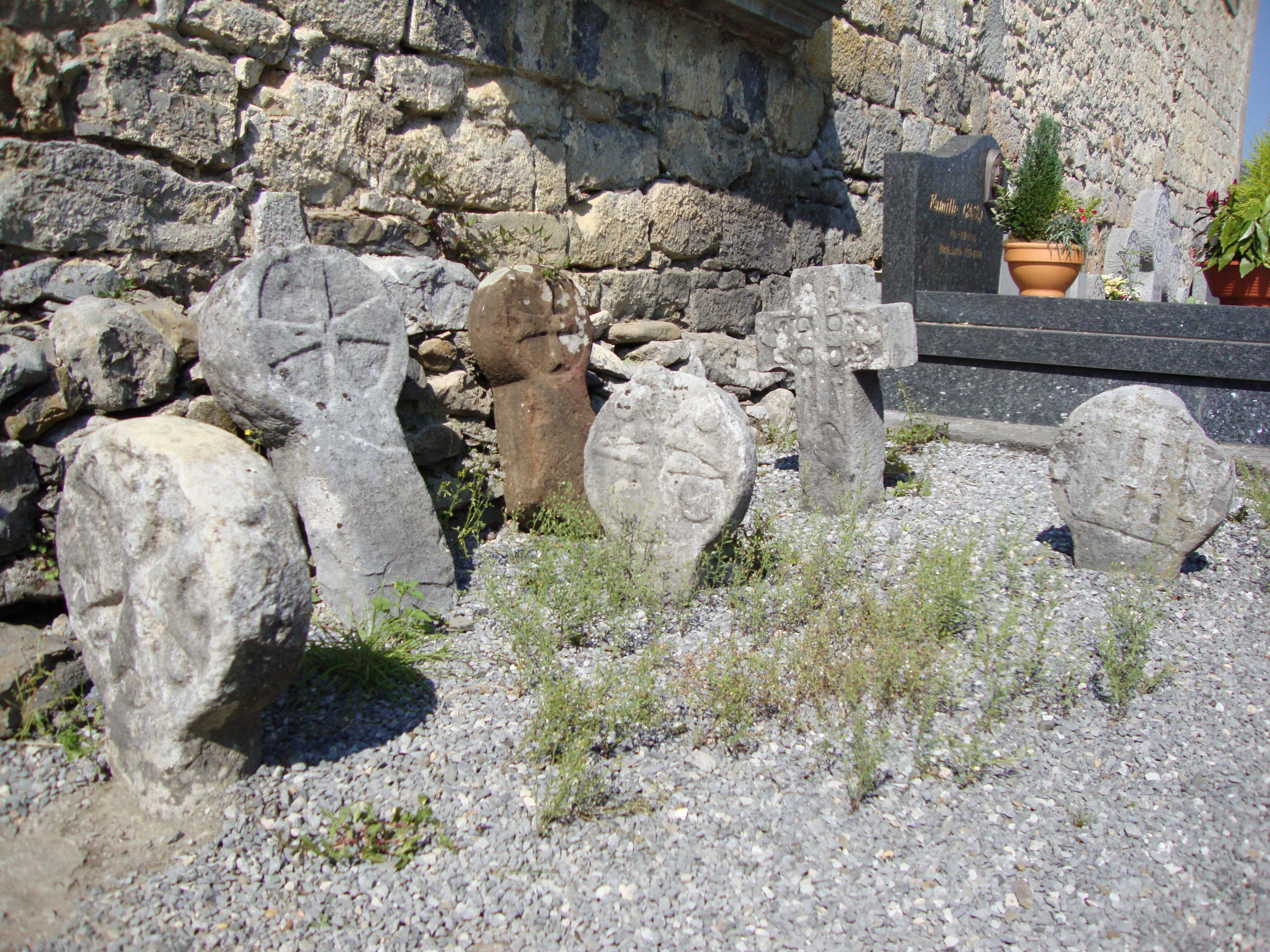 Lacarry (Lacarry e.a. Pyr-Atl, Fr) vieilles stèles basques